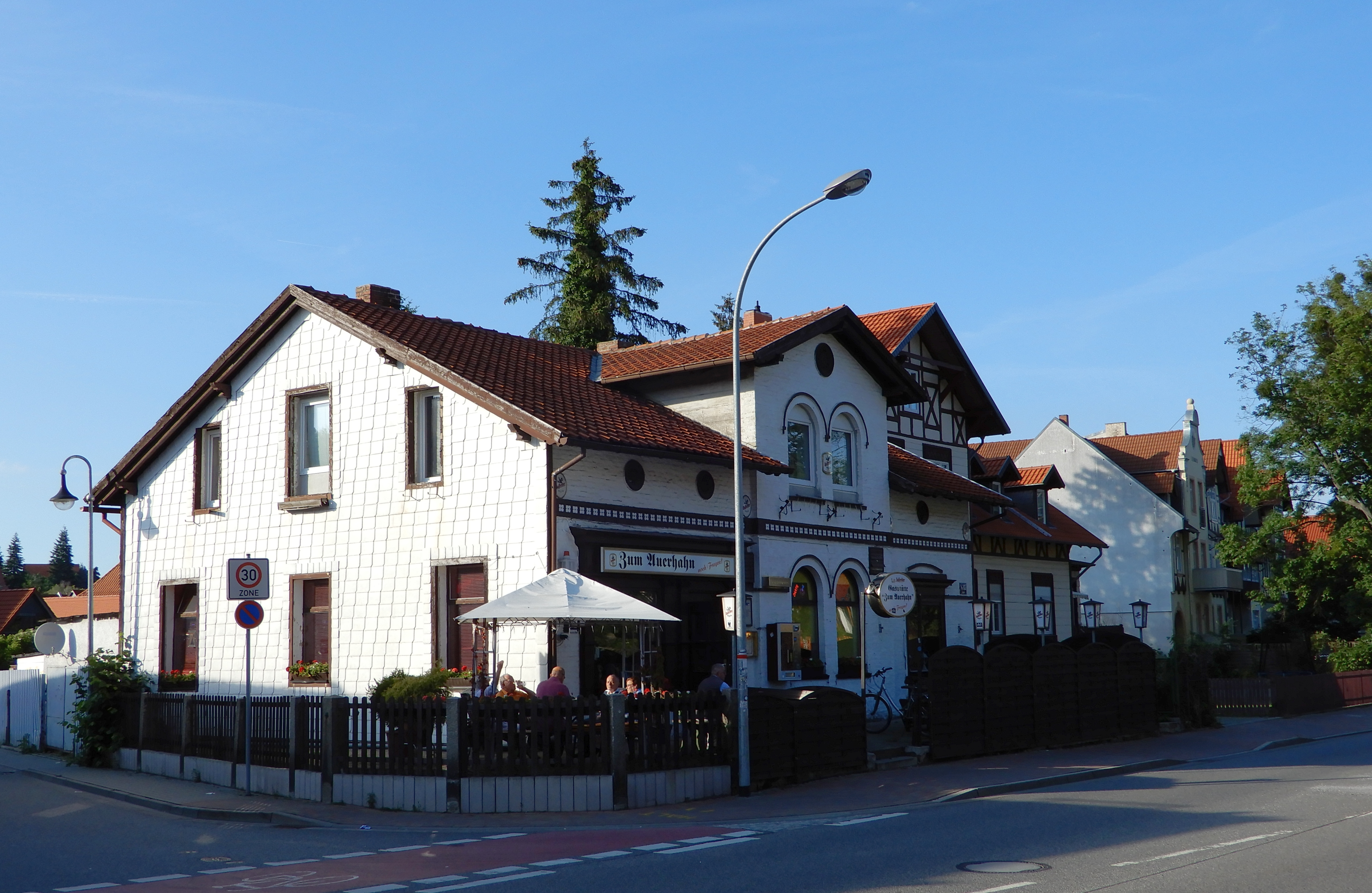 Gastwirtschaft Zum Auerhahn in der Friedrichstraße in Hasserode